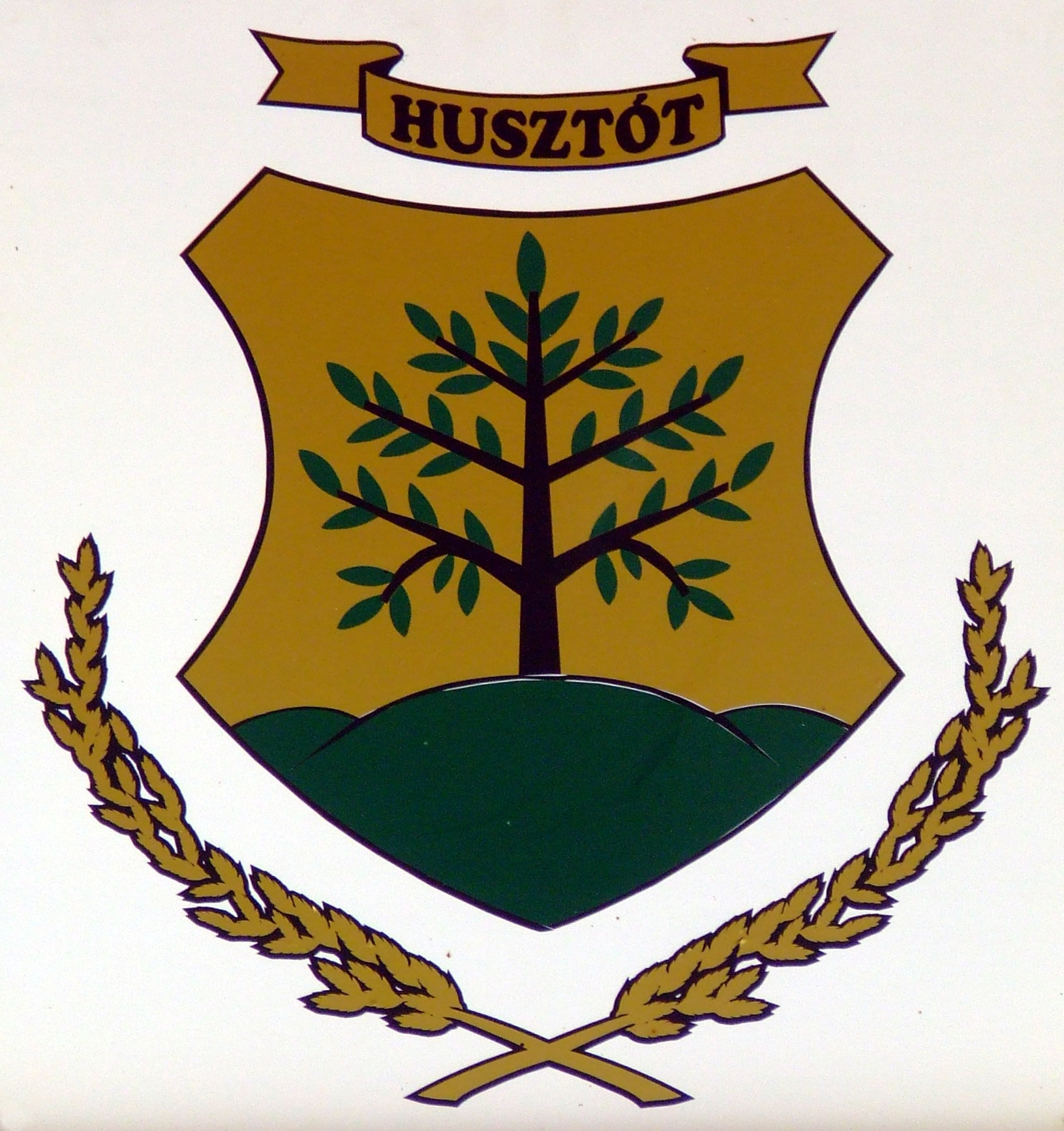 Husztót címere